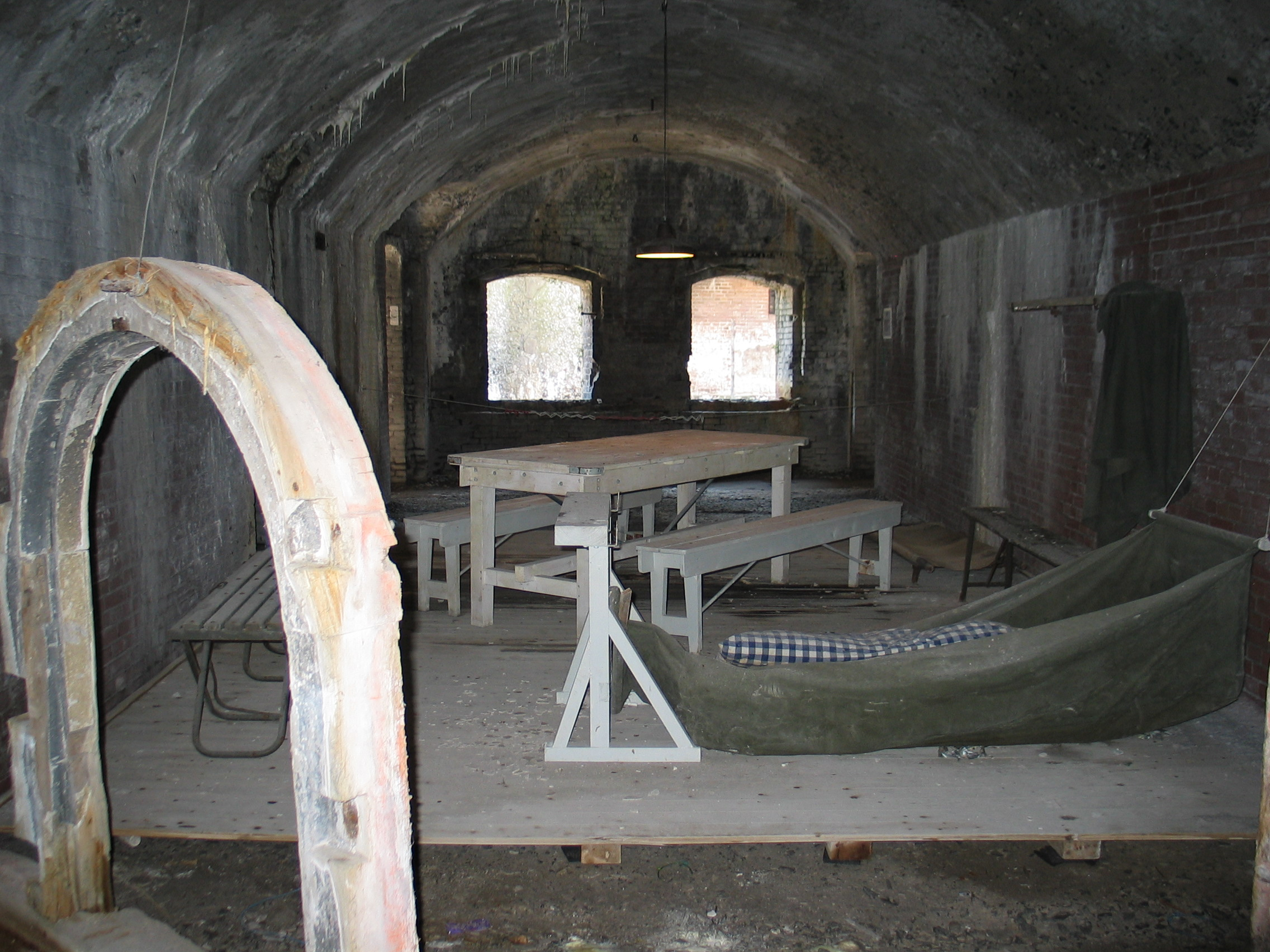 Description Een van de ruimtes in het fort op het eiland Pampus Date10 September 2004SourceOwn workAuthorP. Brundel Een van de ruimtes in het fort op het eiland Pampus